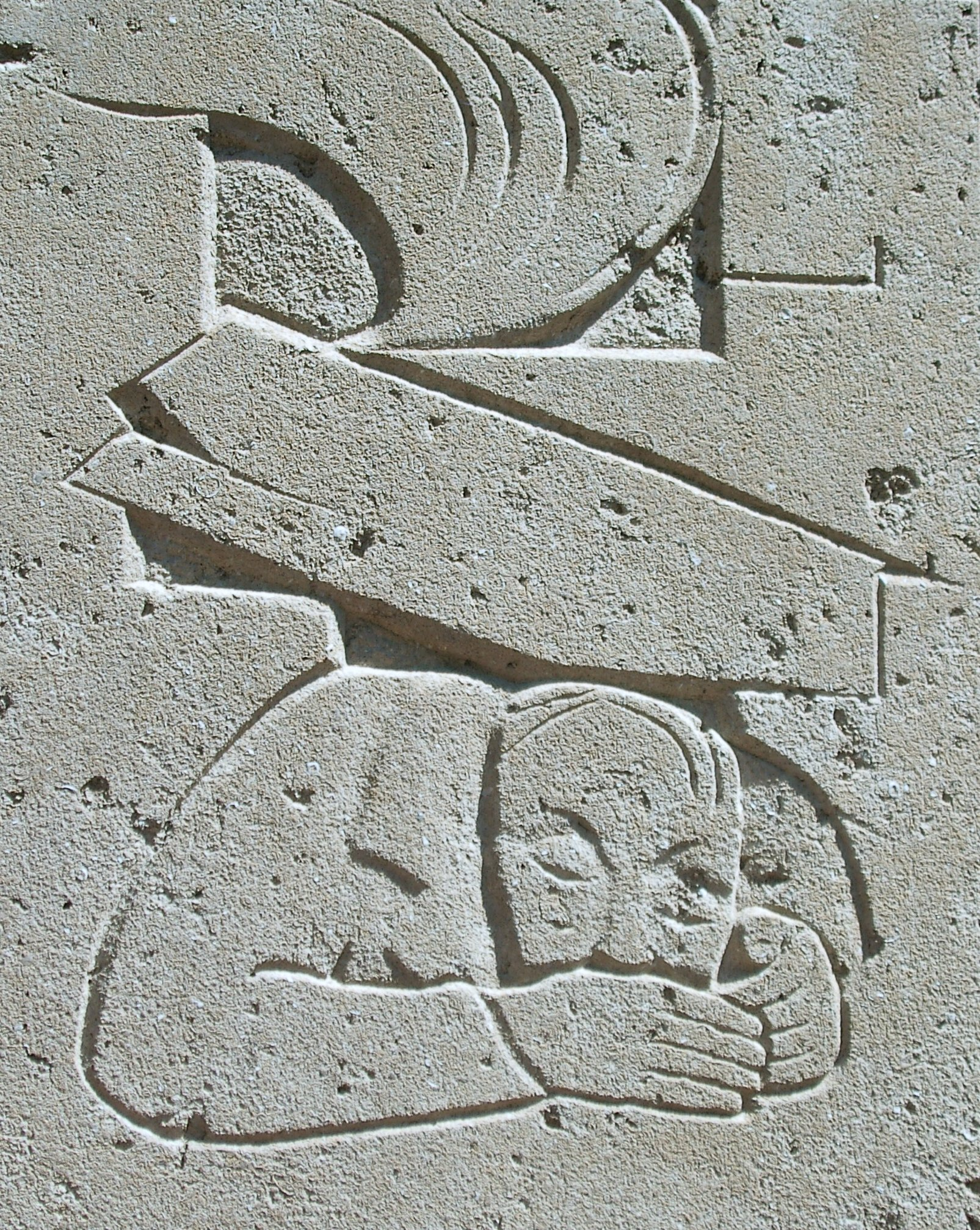 Mahnmal für die Bombenopfer in Dulsberg (Straßenecke Alter Teichweg / Lothringer Straße This is the photograph of an architectural monument. It is part of the list of cultural monuments of Hamburg, no. 773